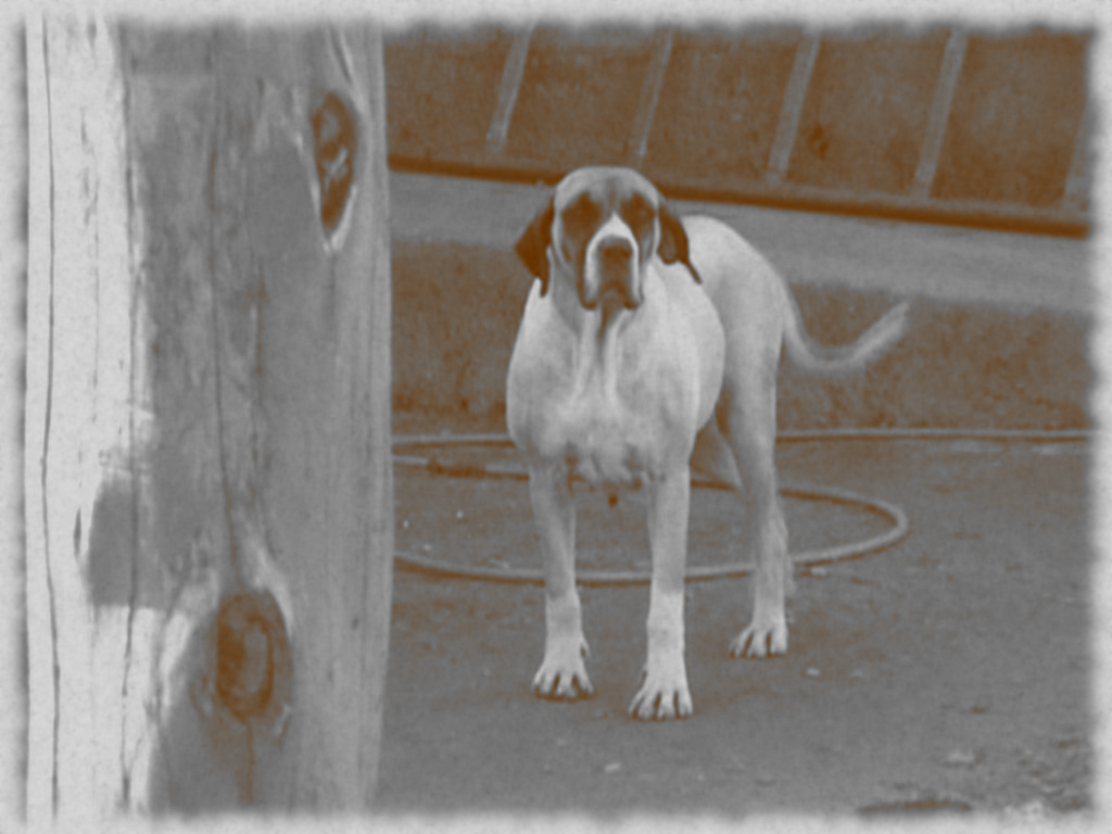 Antiga cadela Original Fila Brasileira adulta